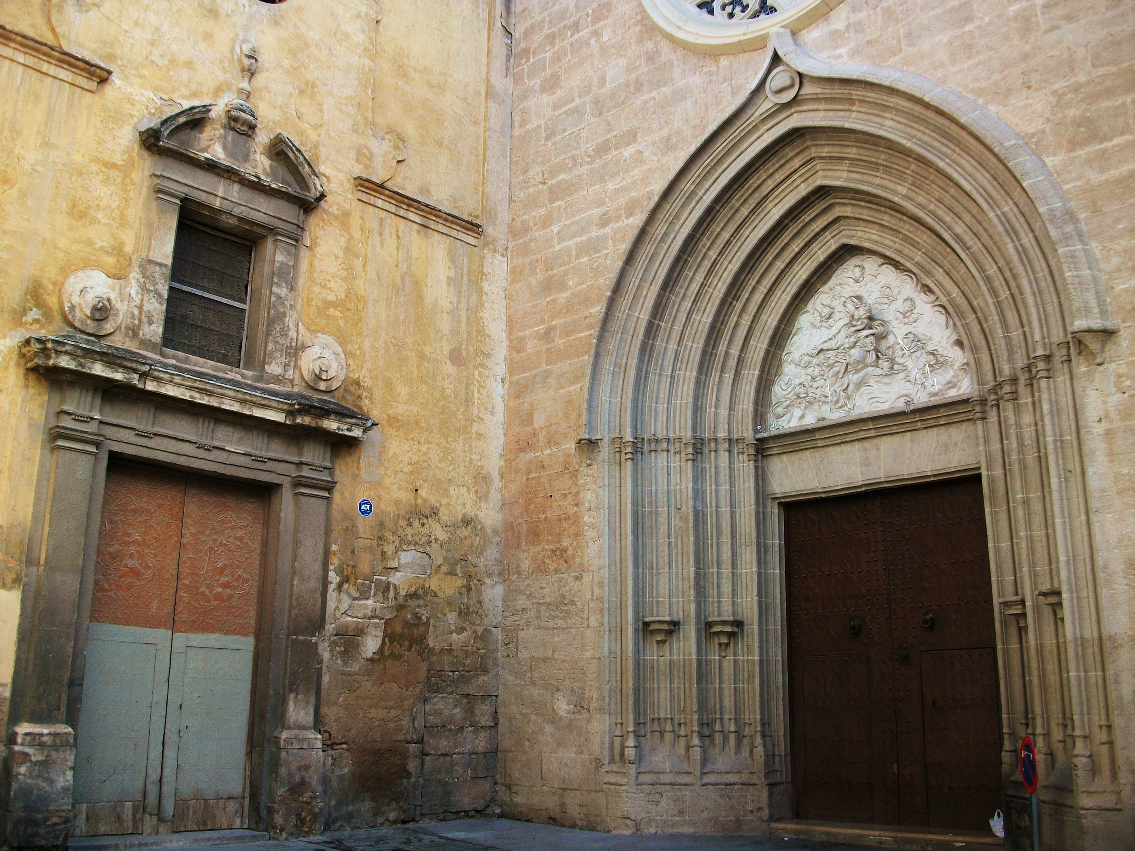 Portades de l'església de Sant Nicolau, la gòtica dels peus i la barroca de la capella de la Comunió.